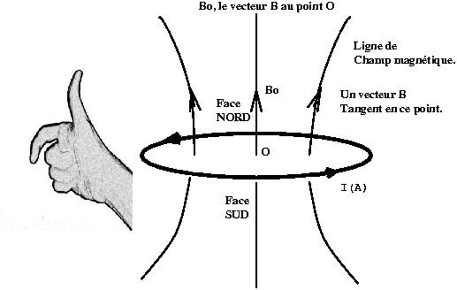 Règle de la main droite donnant le sens du vecteur champ magnétique créé par un spire parcourue par un courant --Djl 12:44, 10 February 2007 (UTC)Jl Domec 10/2/07